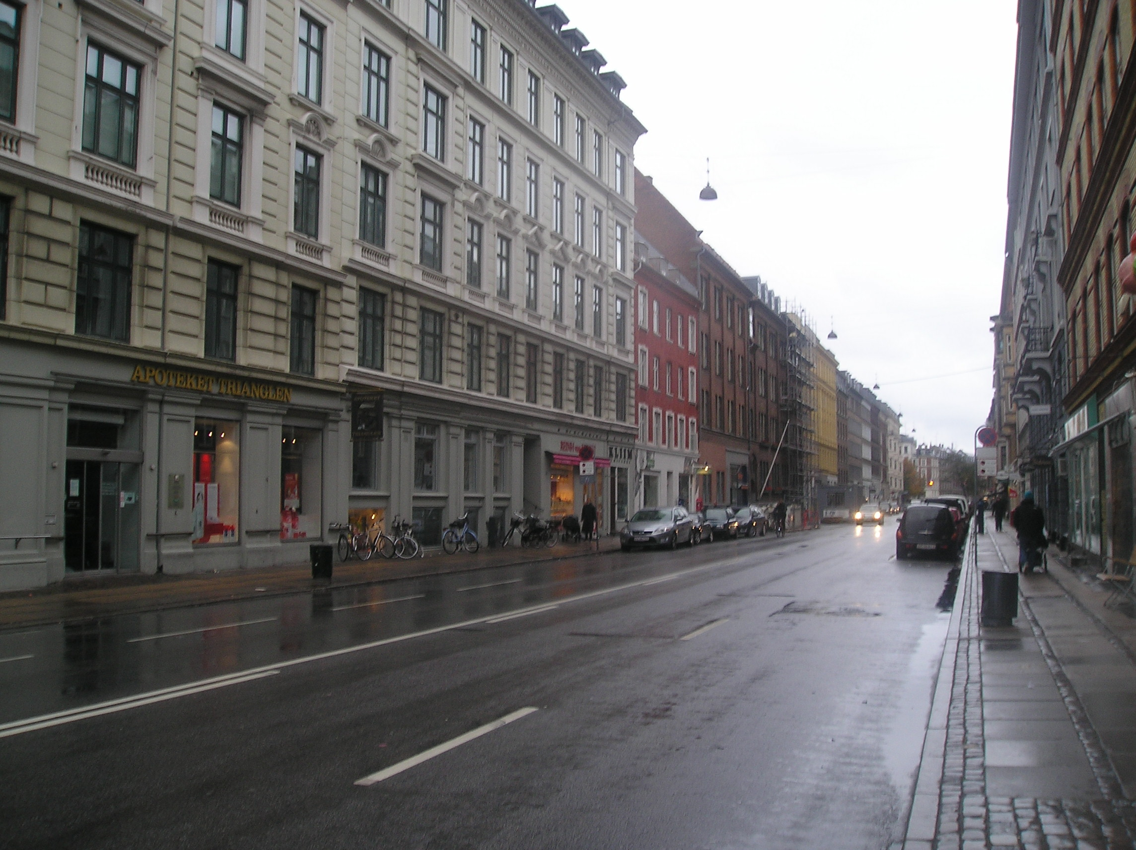 The street Nordre Frihavnsgade in Copenhagen.